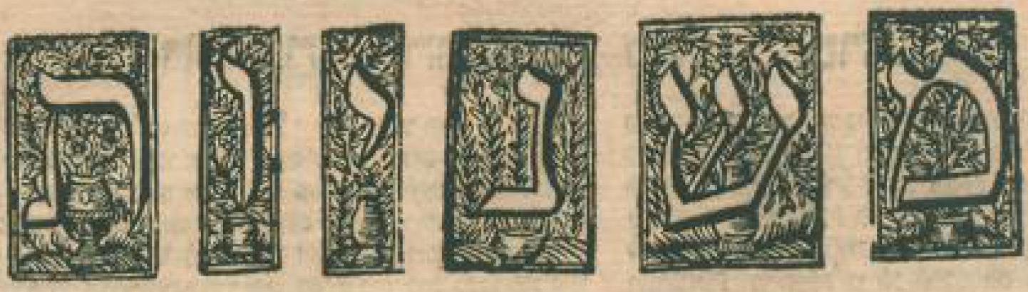 כותרת מעוטרת למשניות בש"ס מהדורת פרנקפורט ה'ת"פ